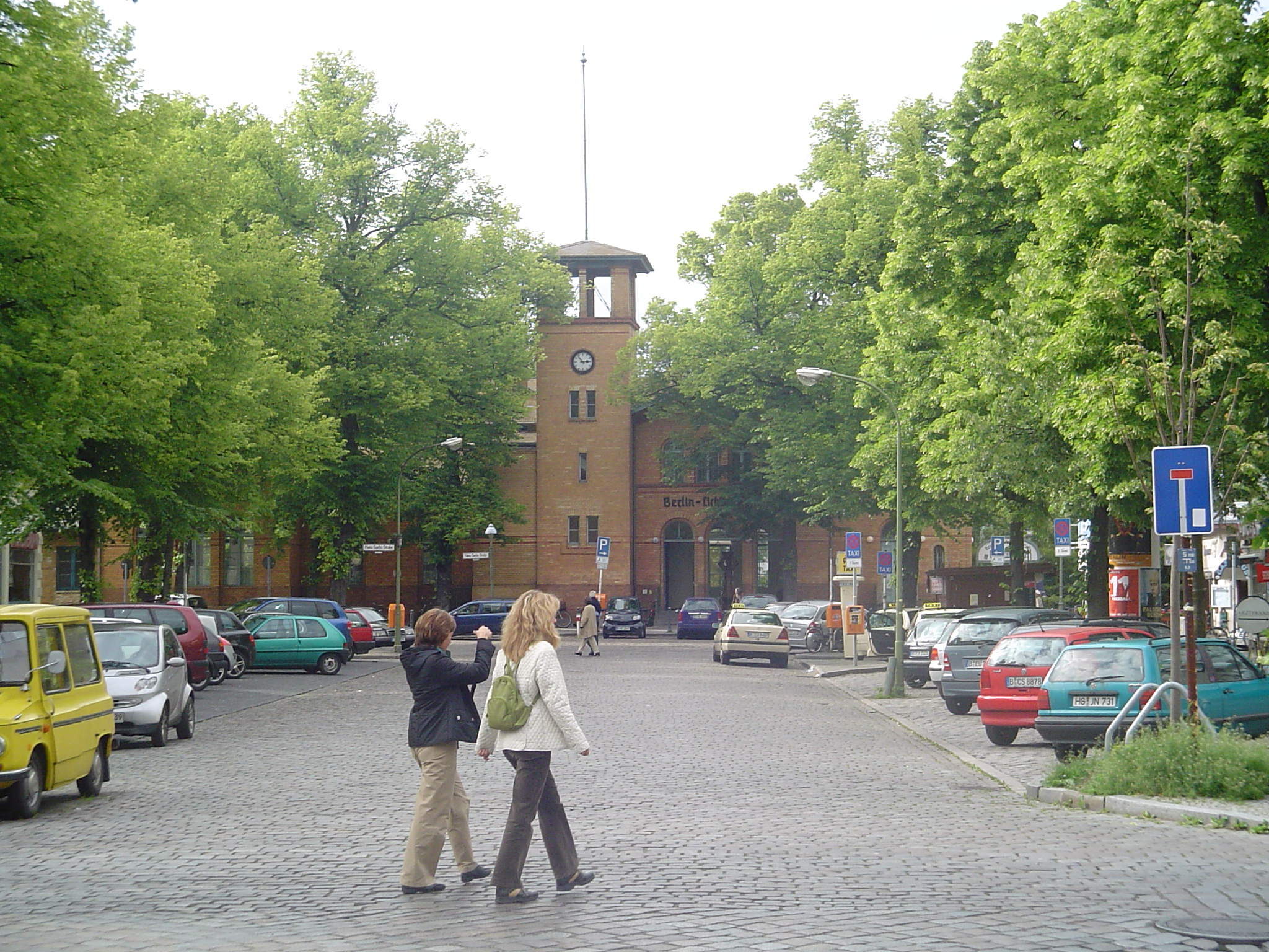 Empfangsgebäude S-Bahnhof Lichterfelde West aus Richtung Süden